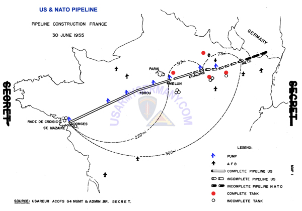 Carte de la construction du pipeline Donges-Metz en 1955.